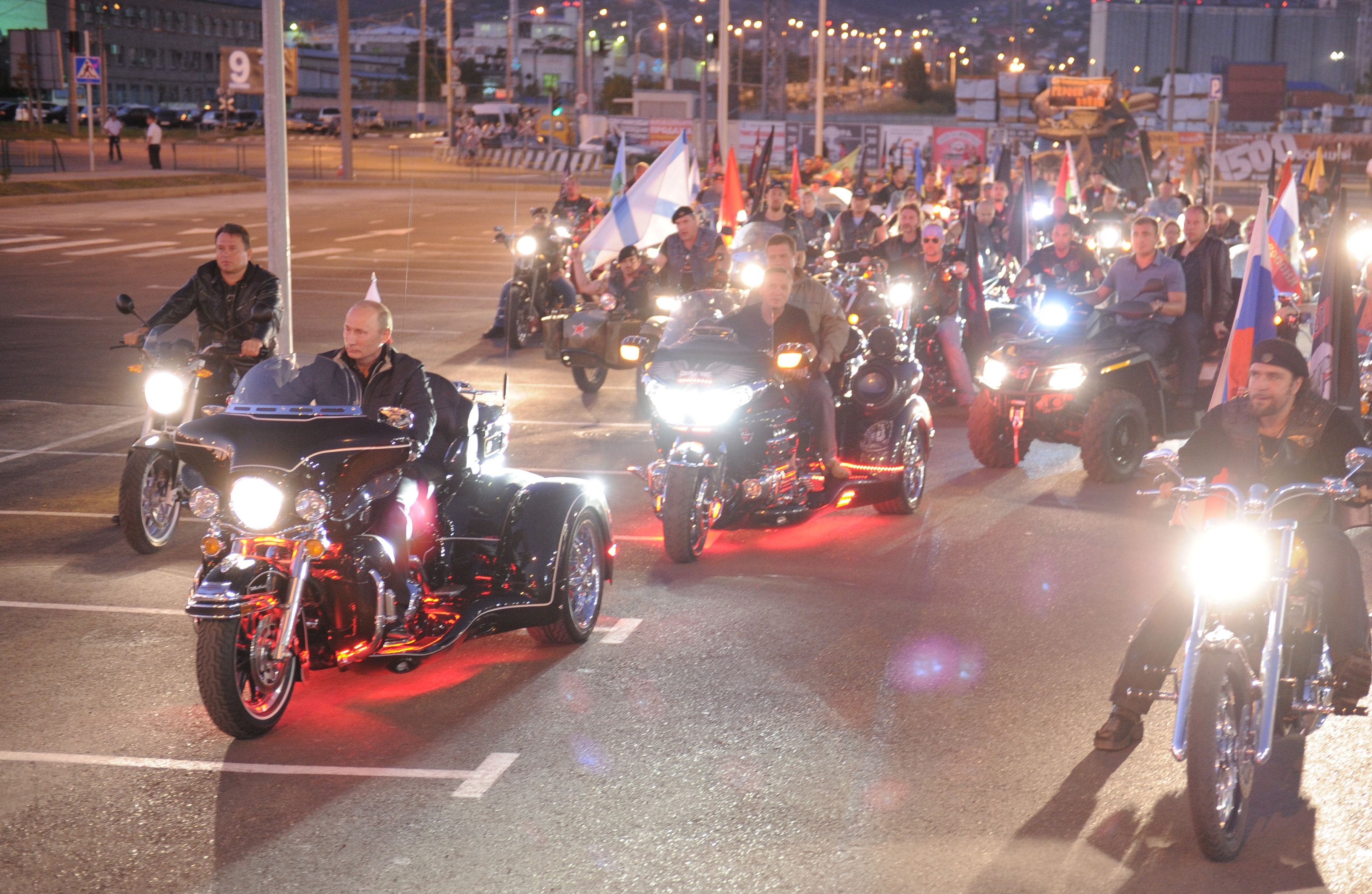 Председатель Правительства России В.В.Путин посетил международное байк-шоу в Новороссийске